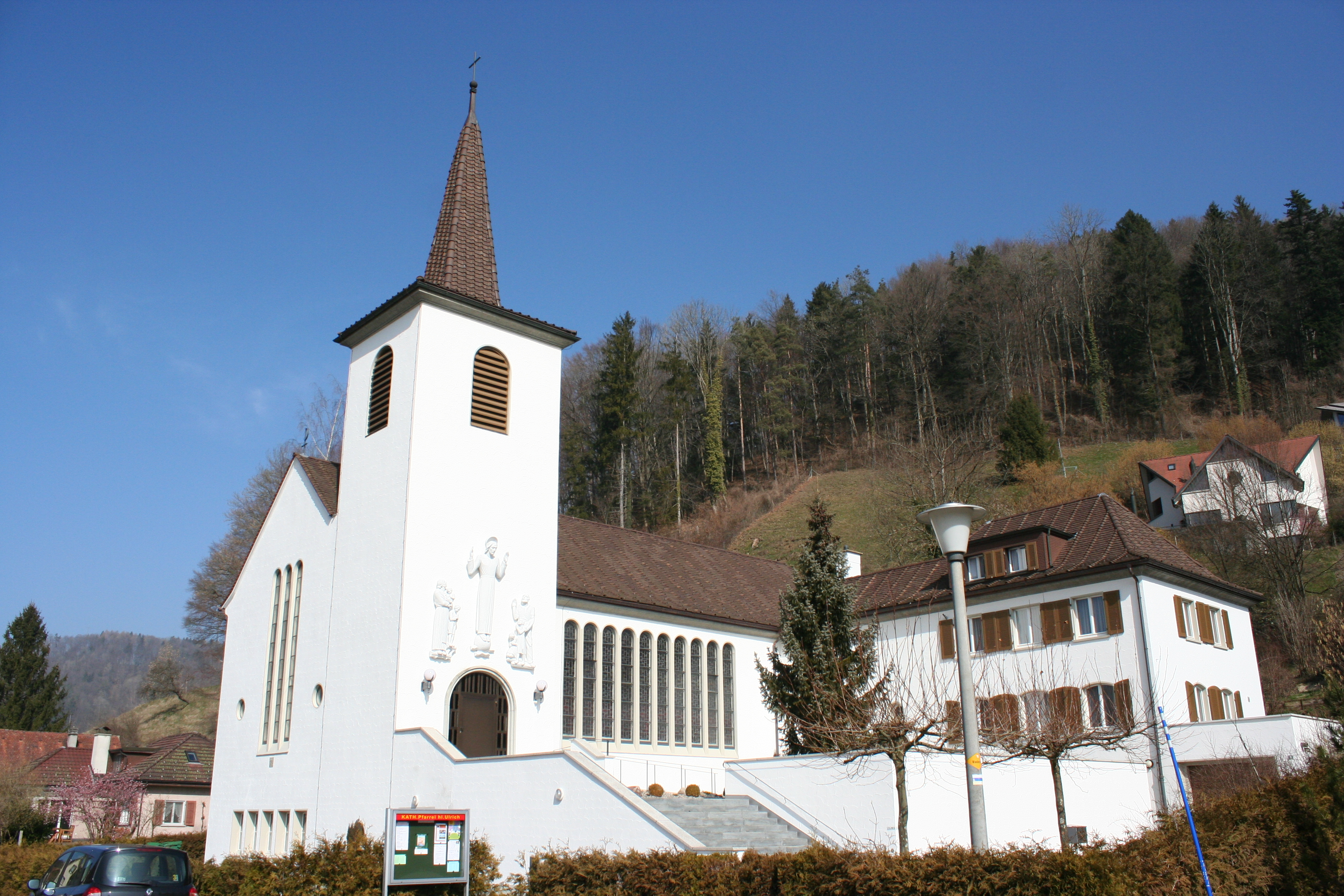 Römisch-katholische Pfarrkirche Herz Jesu Turbenthal